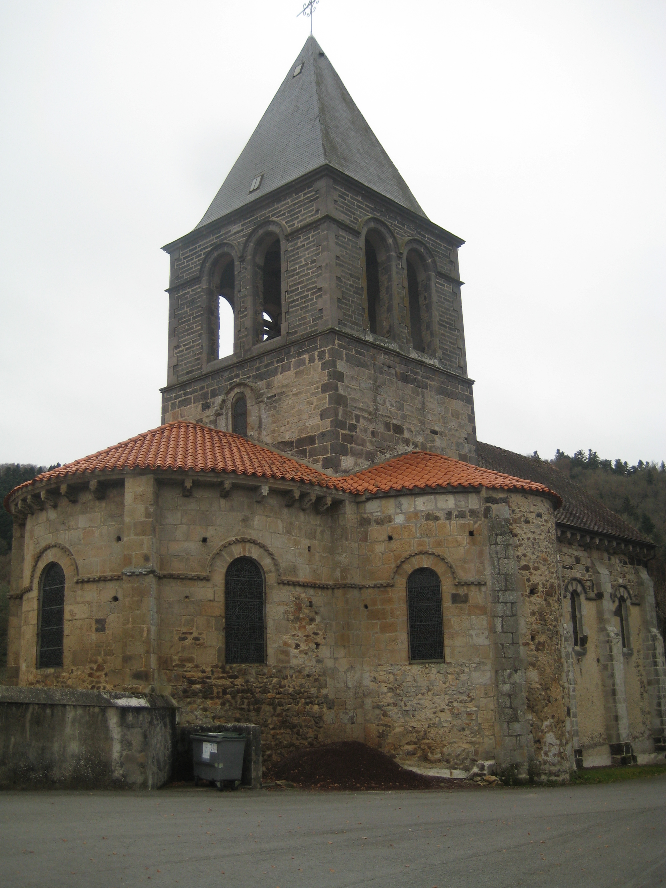 Église Saint-Léger de Montfermy